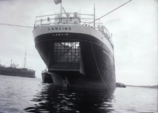 Hvalkokeriet Lancing, tilhørende Hvalfangerselskapet Globus i Larvik. Lancing var det første kokeriet som var utstyrt med opphalingsslipp.